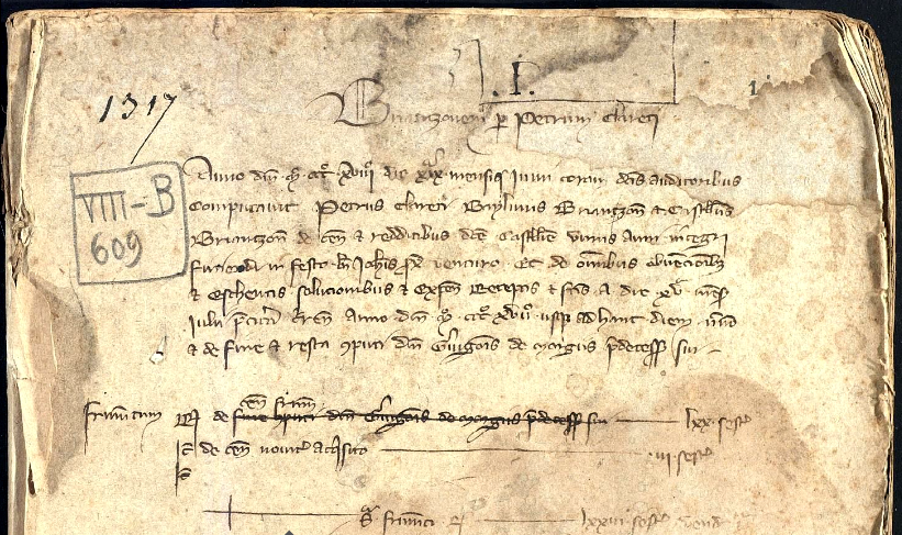 Comptes du Grésivaudan, du Briançonais et de l'Embrunais (1317) extrait 1ère page.